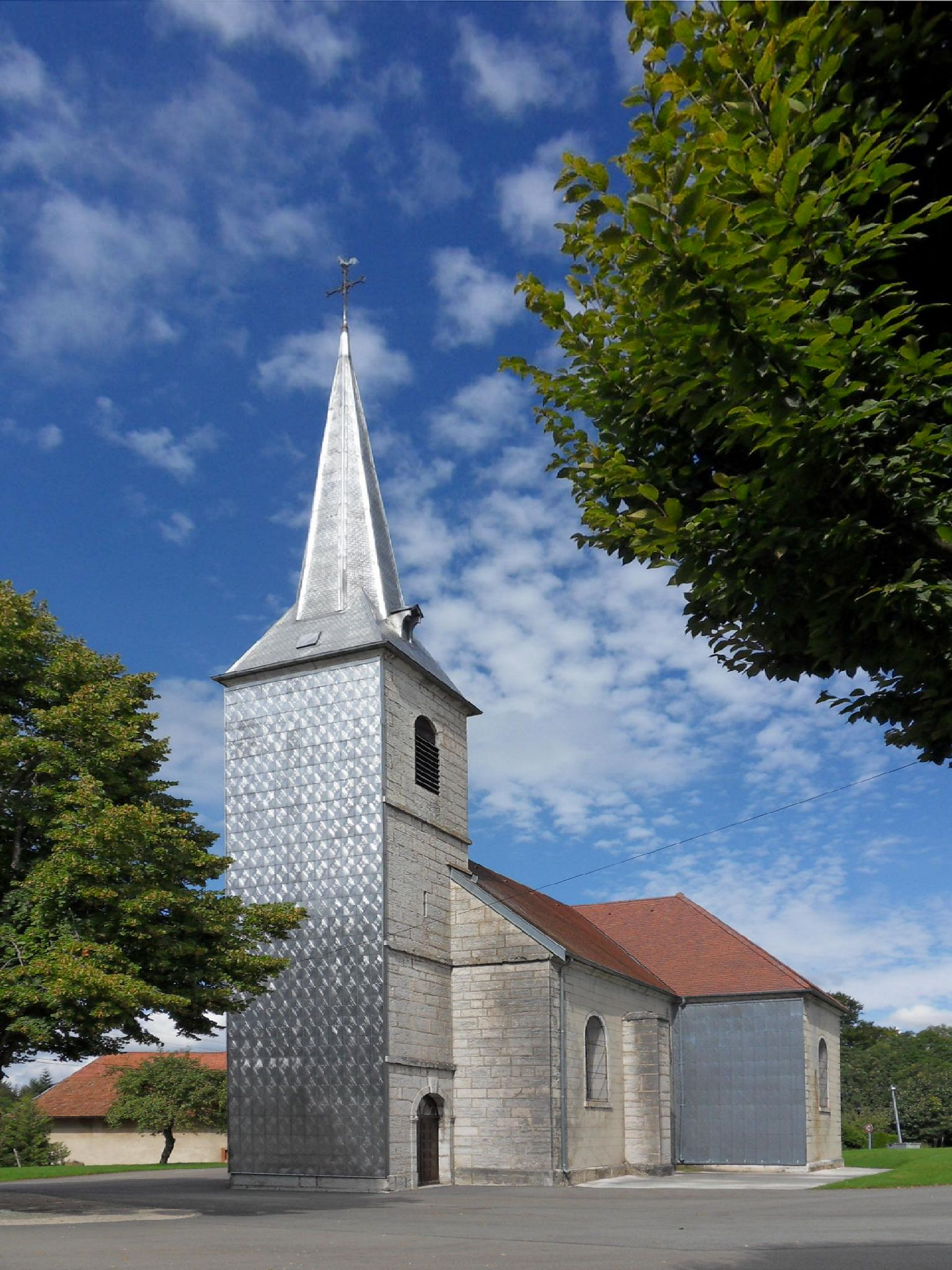 Longemaison.